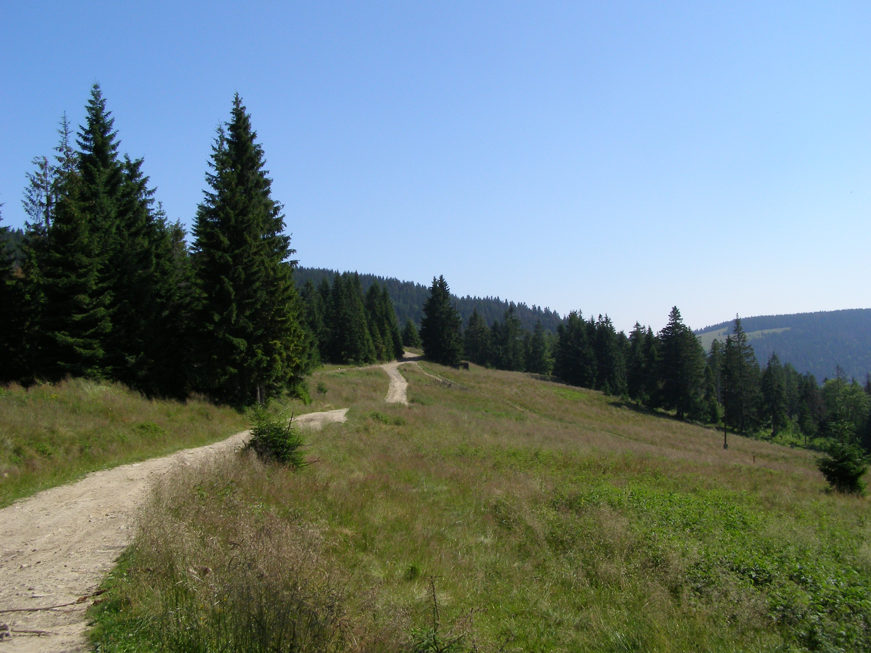 Gorce - Wisielakówka